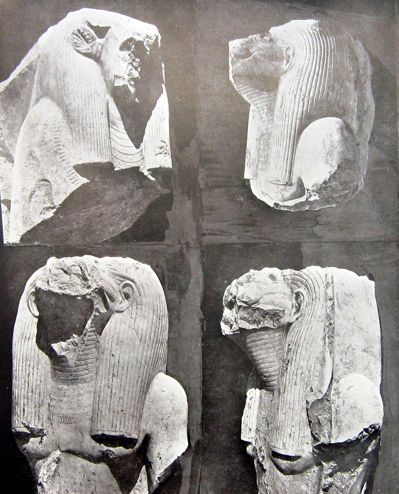 Vestige du labyrinthe de Hawara